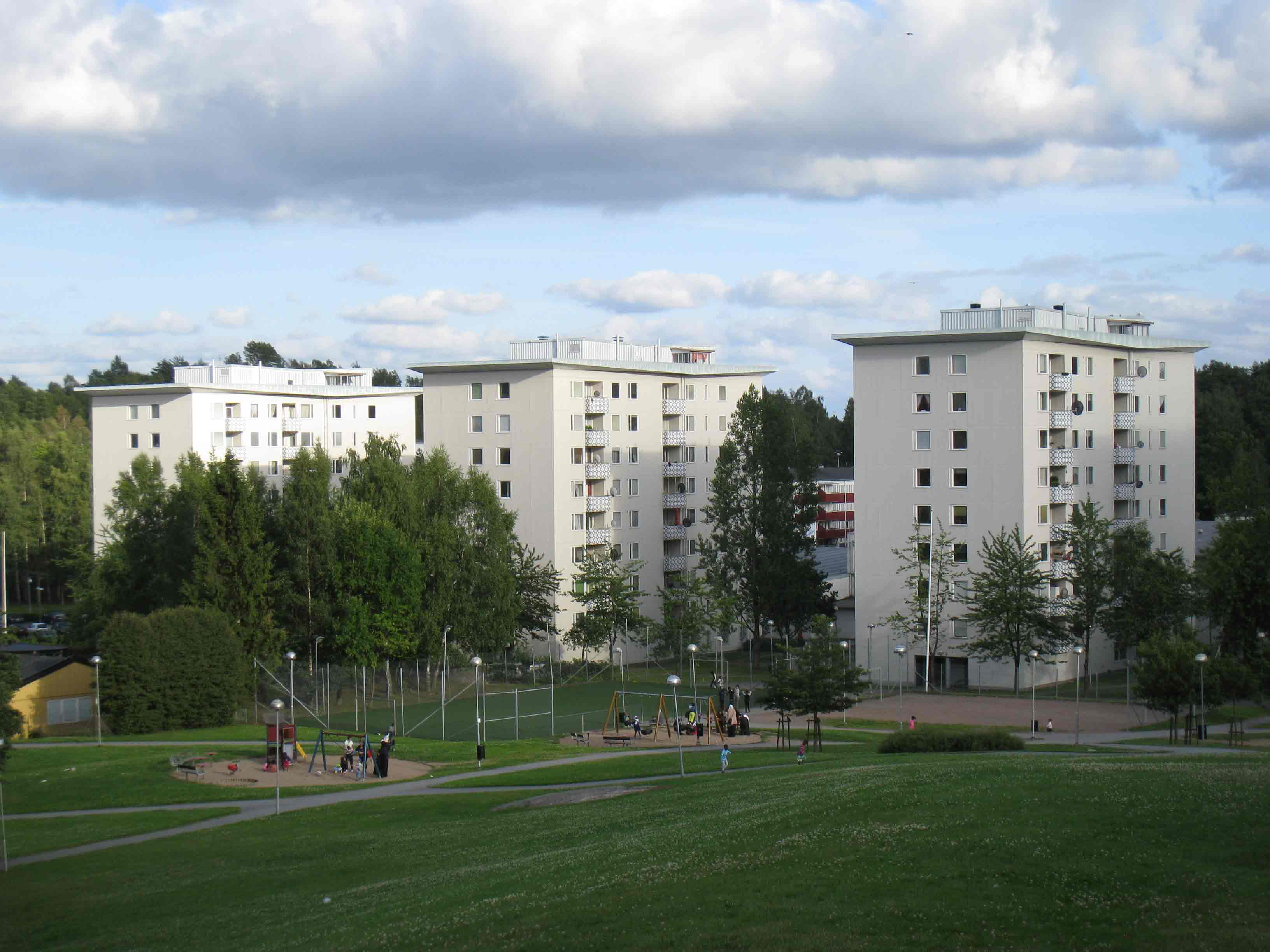 Lekäng mellan Rymdtorget och Tellusgatan, Bergsjön, Göteborg